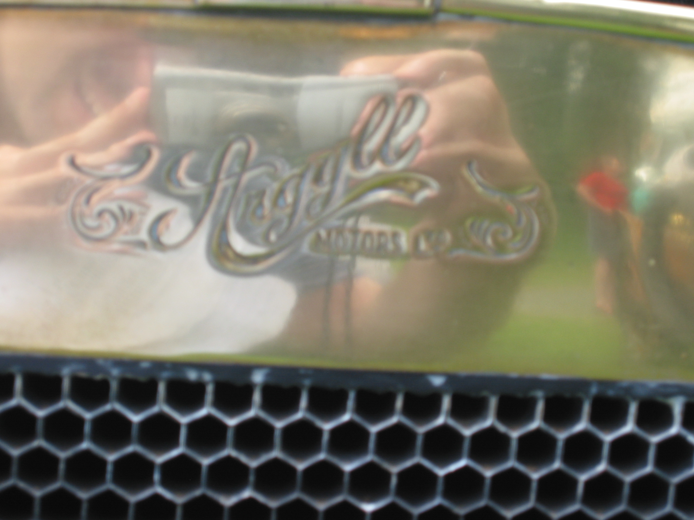 Emblem Argyll 1908